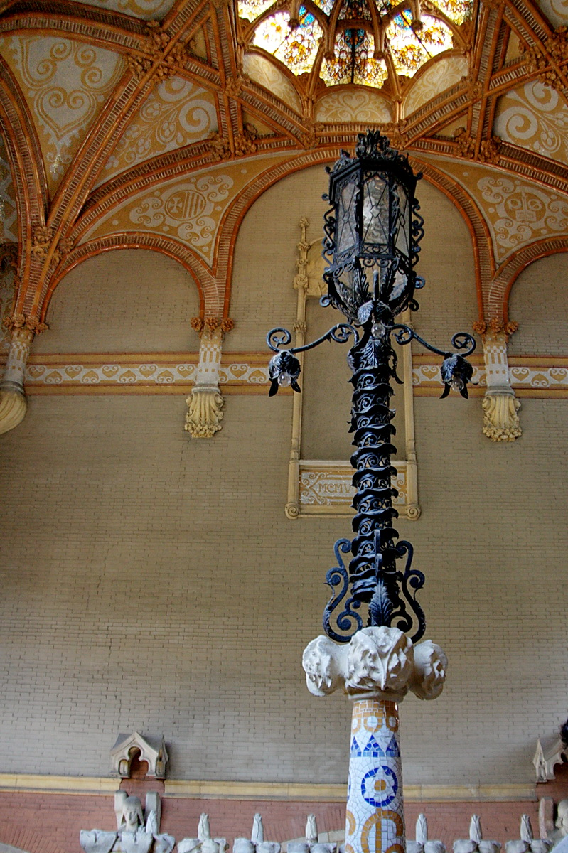 Fanal de forja a l'escala principal de l'hospital de Sant Pau de Barcelona (1905). És obra de Josep Perpinyà.